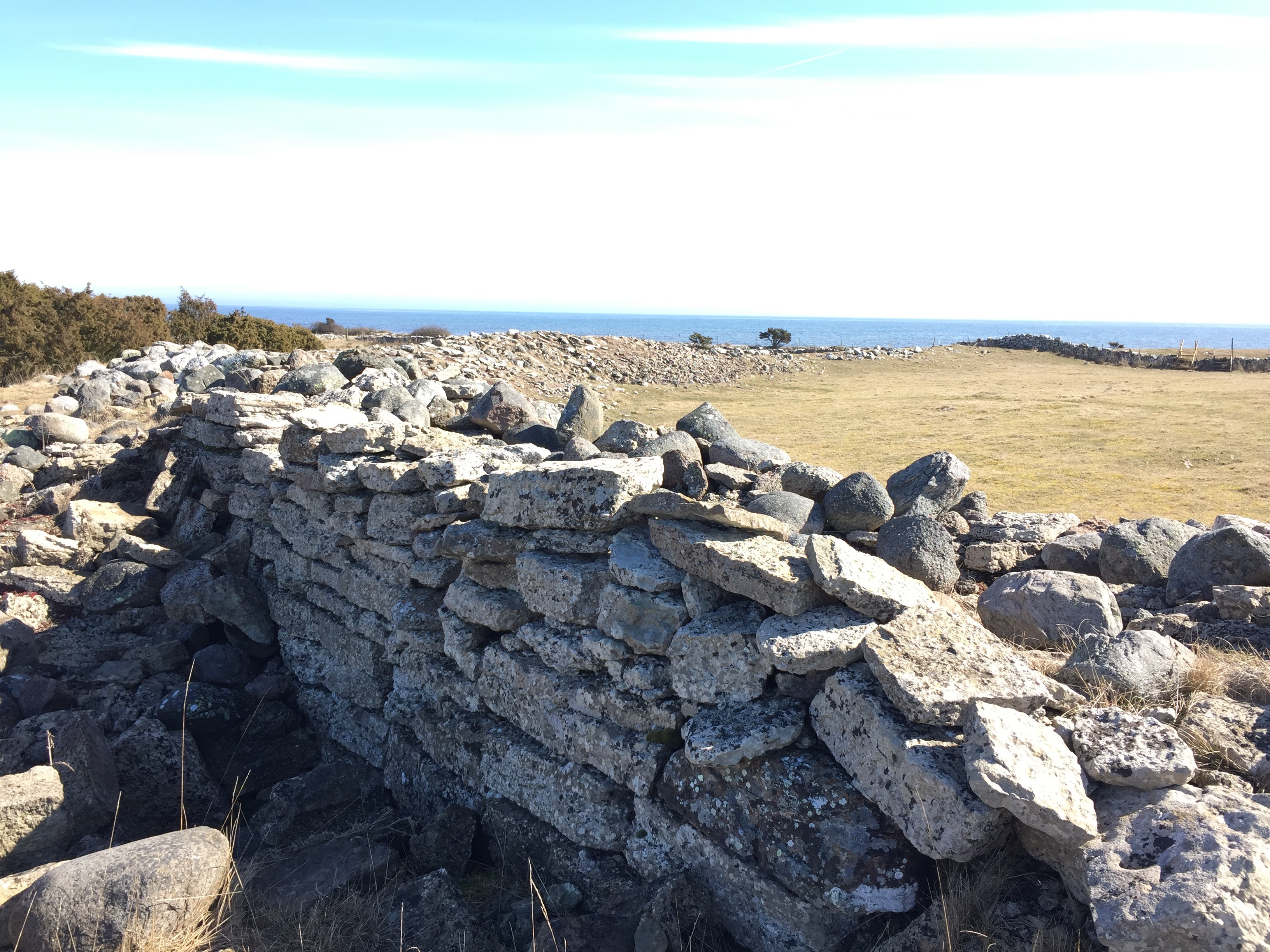 Del av den västra delen av muren rund Sandby Borg sedd öster ut.